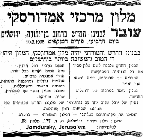 מודעה בגין מלון אמדורסקי מעיתון דבר